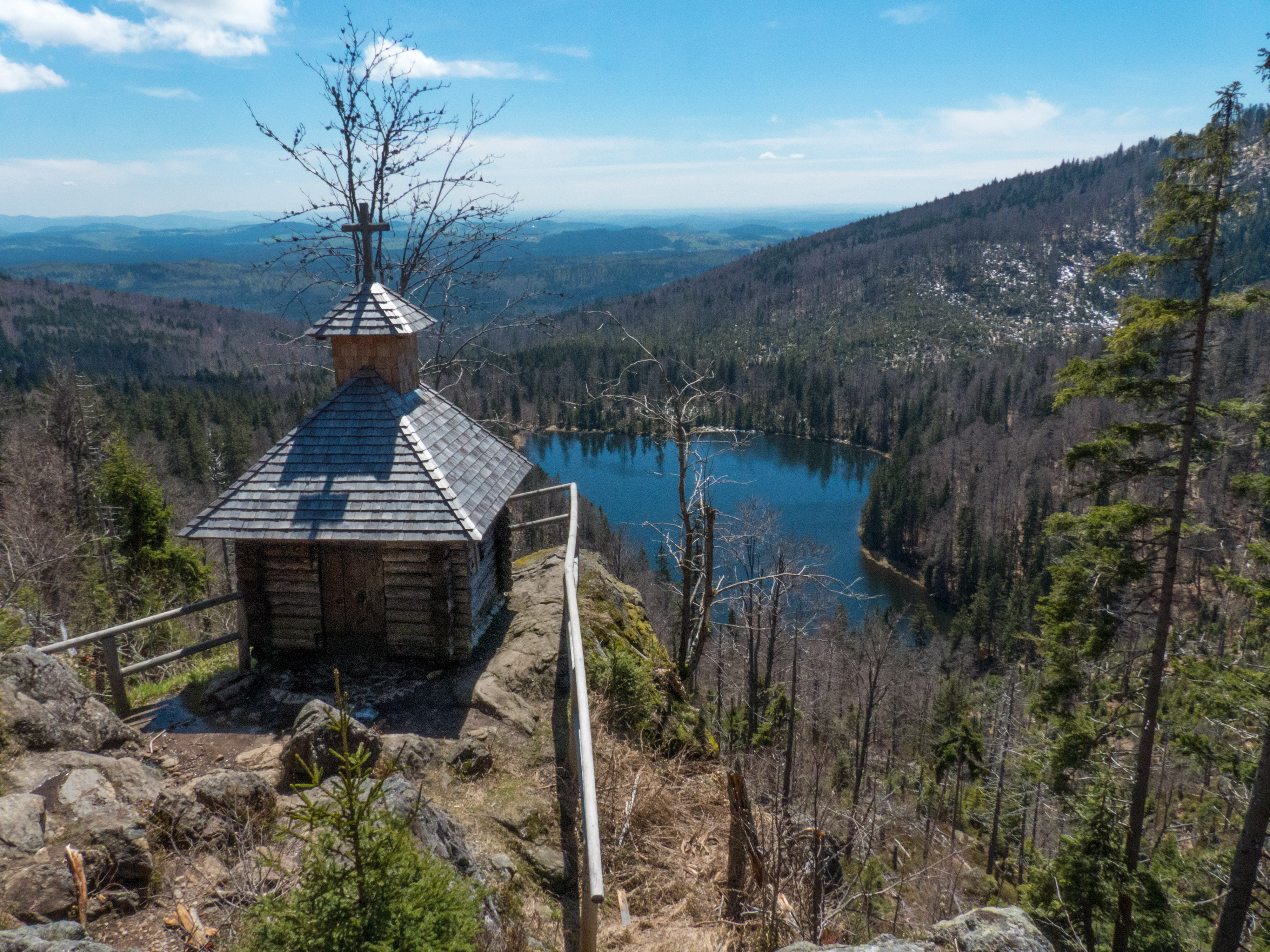 Unser "Basislager" für die Touren um Spiegelau im Mai 2017: Meine Bewertung für diese Unterkunft: Zu gut, zu sauber, zu freundlich, zu lecker, zu ruhig, zu preiswert für diese Welt (allein das Wetter hätte etwas besser sein können!).